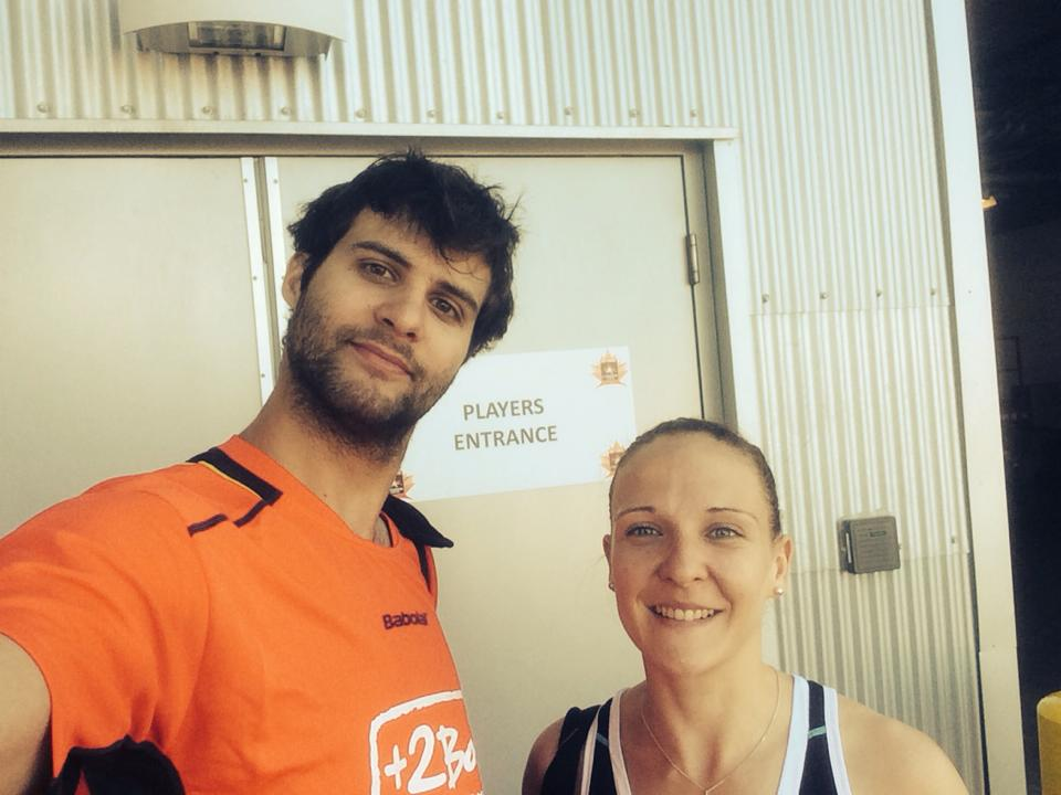 Ronan Labar et sa partenaire de mixte Emilie Lefel